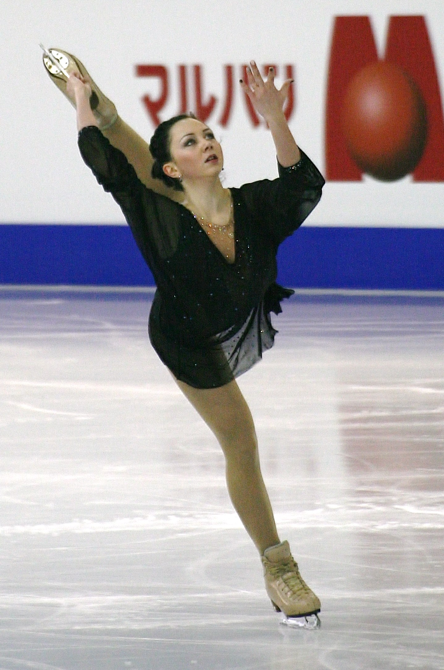 Елизавета Туктамышева (Россия) на финале Гран-при по фигурному катанию 2014-2015.